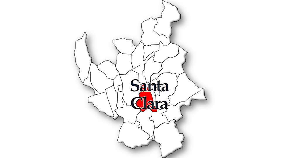 População